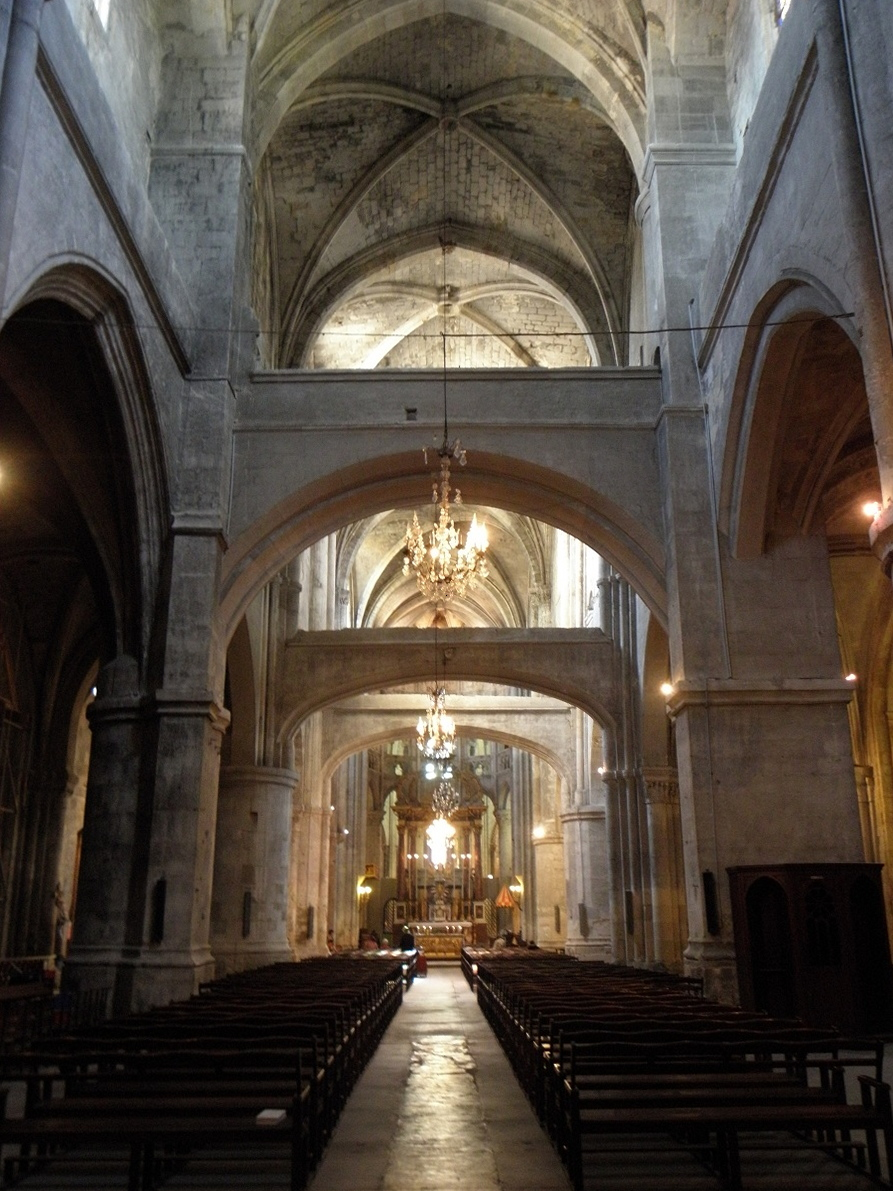 Basilique Saint-Paul de Narbonne (11). Nef principale. .